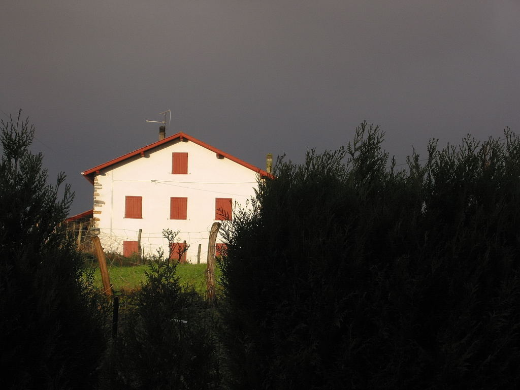 Ahetze (France), maison basque sous l'orage, prise le 01/01/06 par Harrieta171